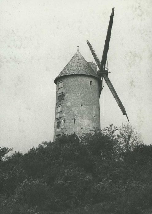 Mühle in Renac